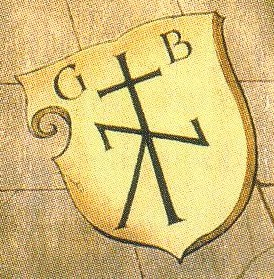 Wappen des Dresdner Bürgermeisters Greger Byner (Ausschnitt aus der 10. Gebotstafel von Hans dem Maler, 1529)